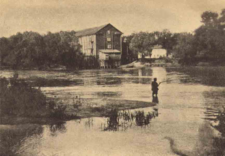 Il luogo di Voronez dove si tenne il congresso di Zemlja i Volja nel luglio 1879